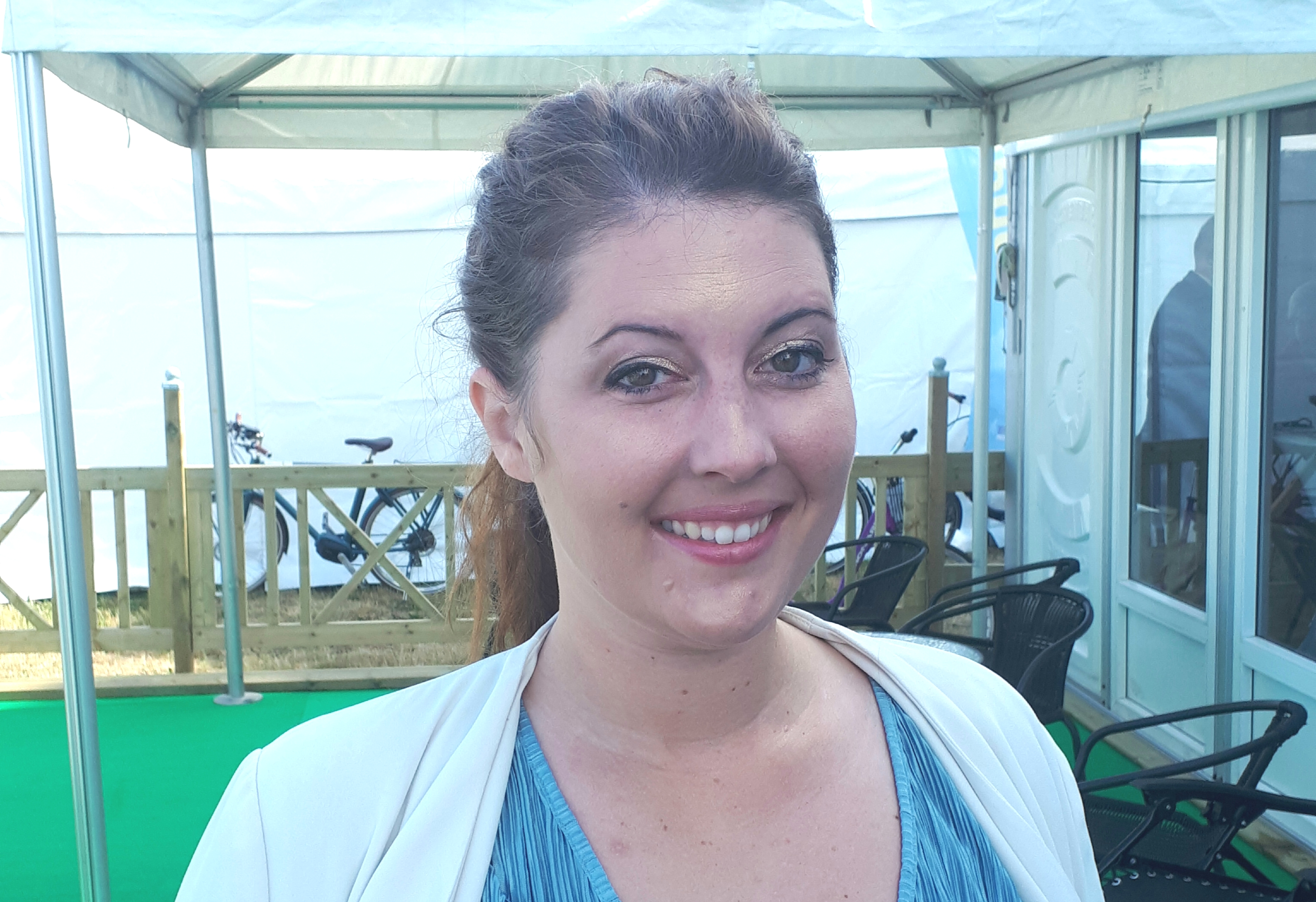 Beatrice Rindevall efter ett seminarium under Almedalsveckan i Visby 3 juli 2019.